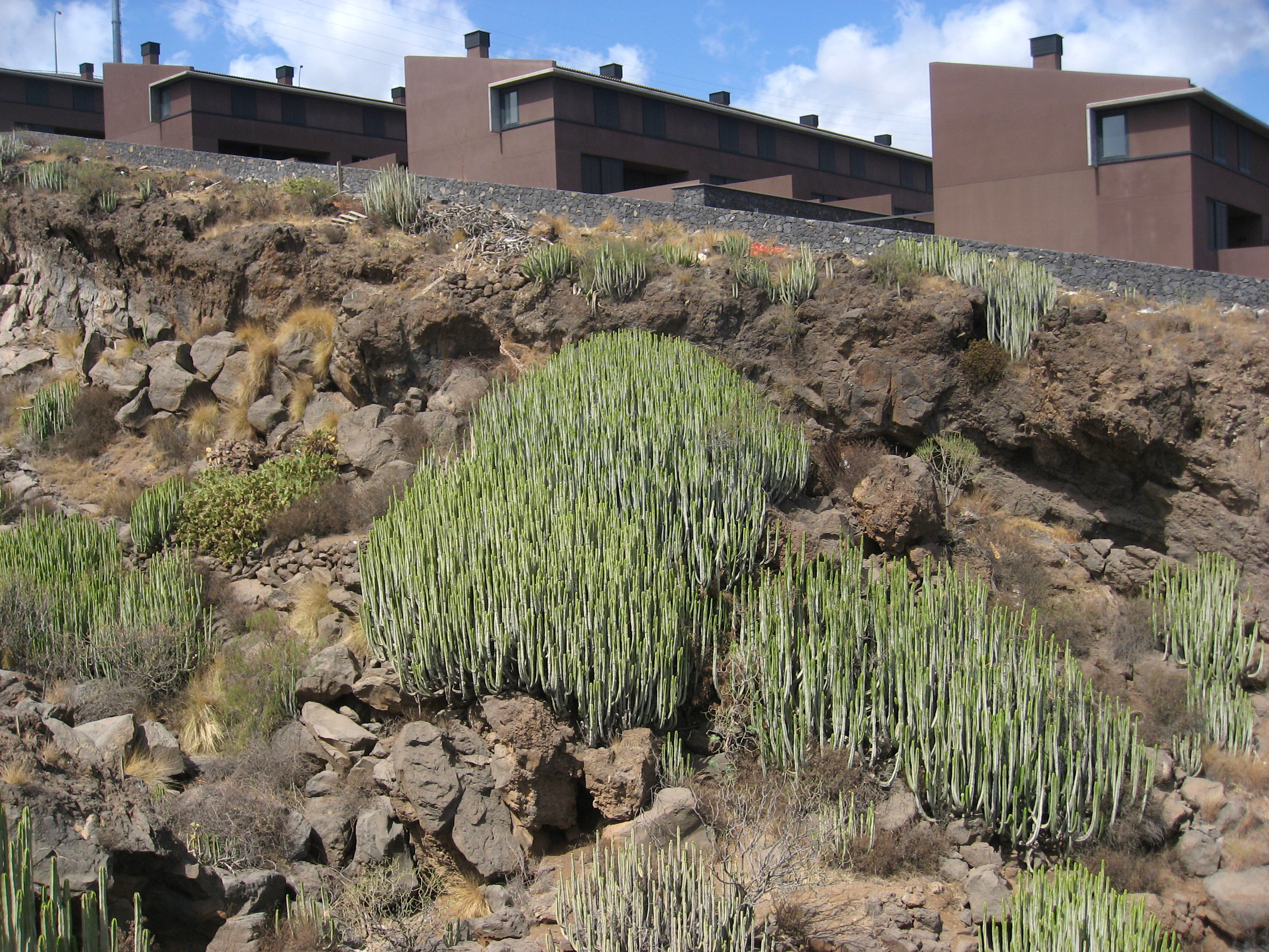 Acorán desde el barranco El Pilar